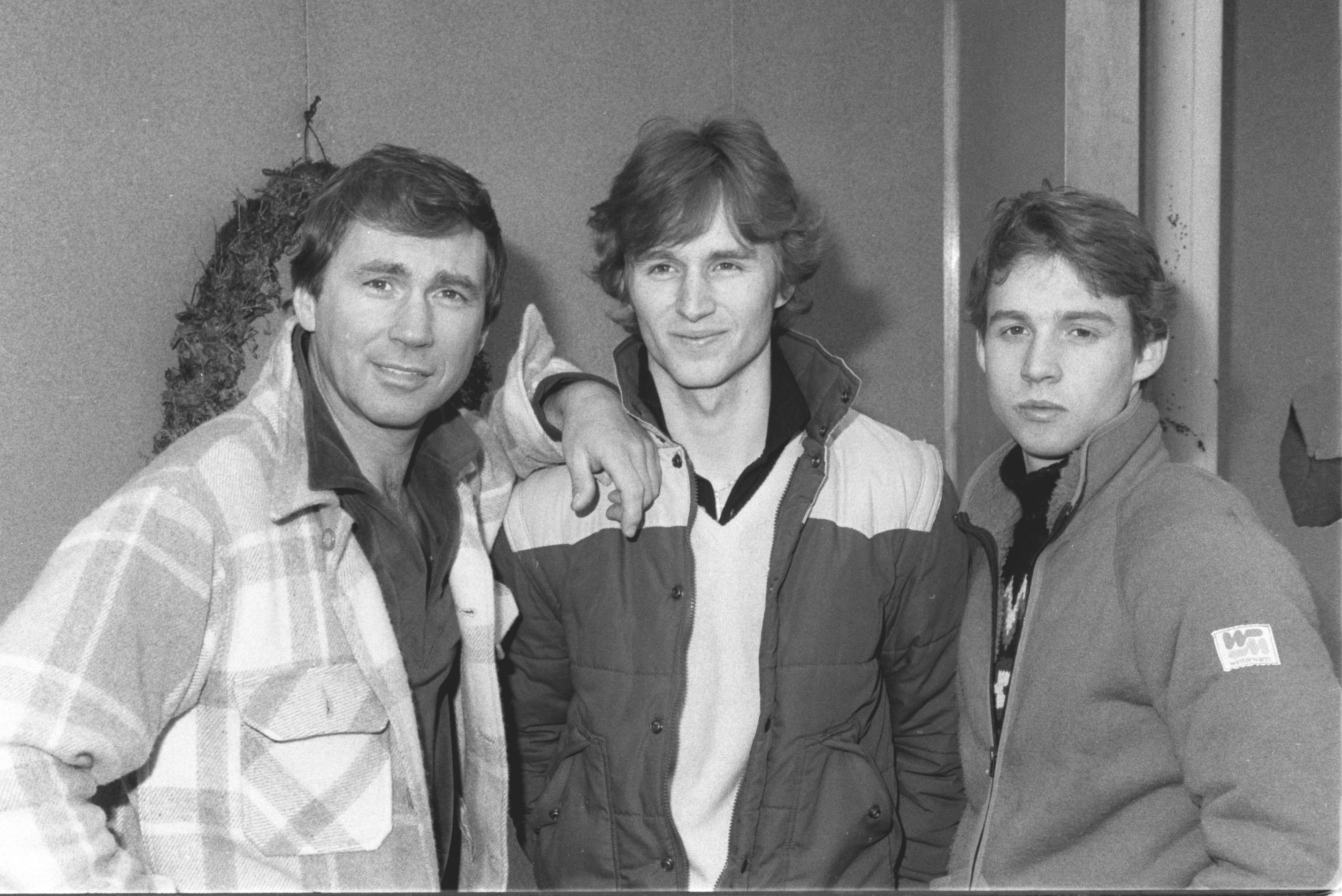 Travfamiljen Takter, från vänster: Bo och hans söner Johnny och Jimmy.